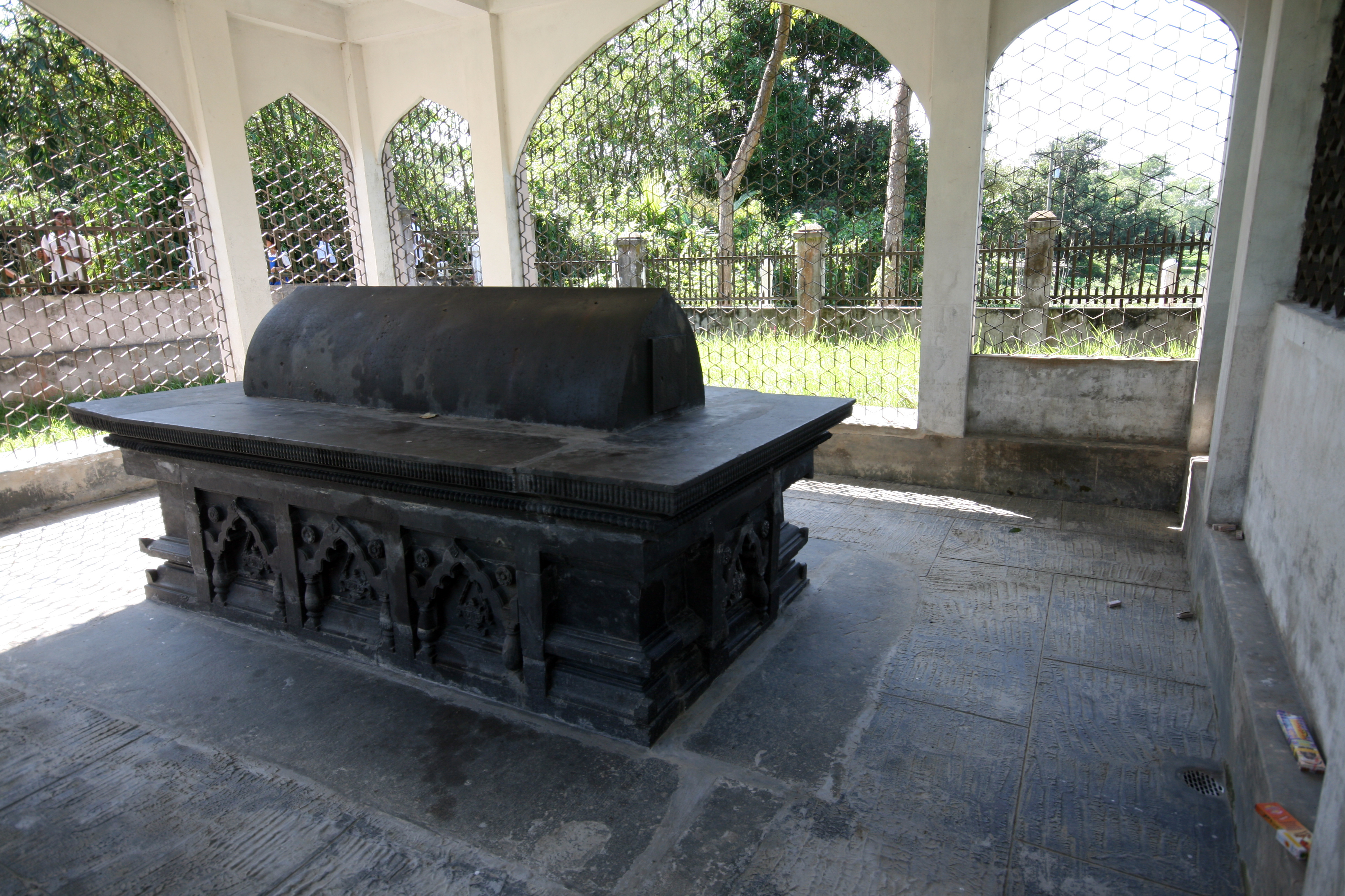 গিয়াসউদ্দিন আজম শাহের মাজার